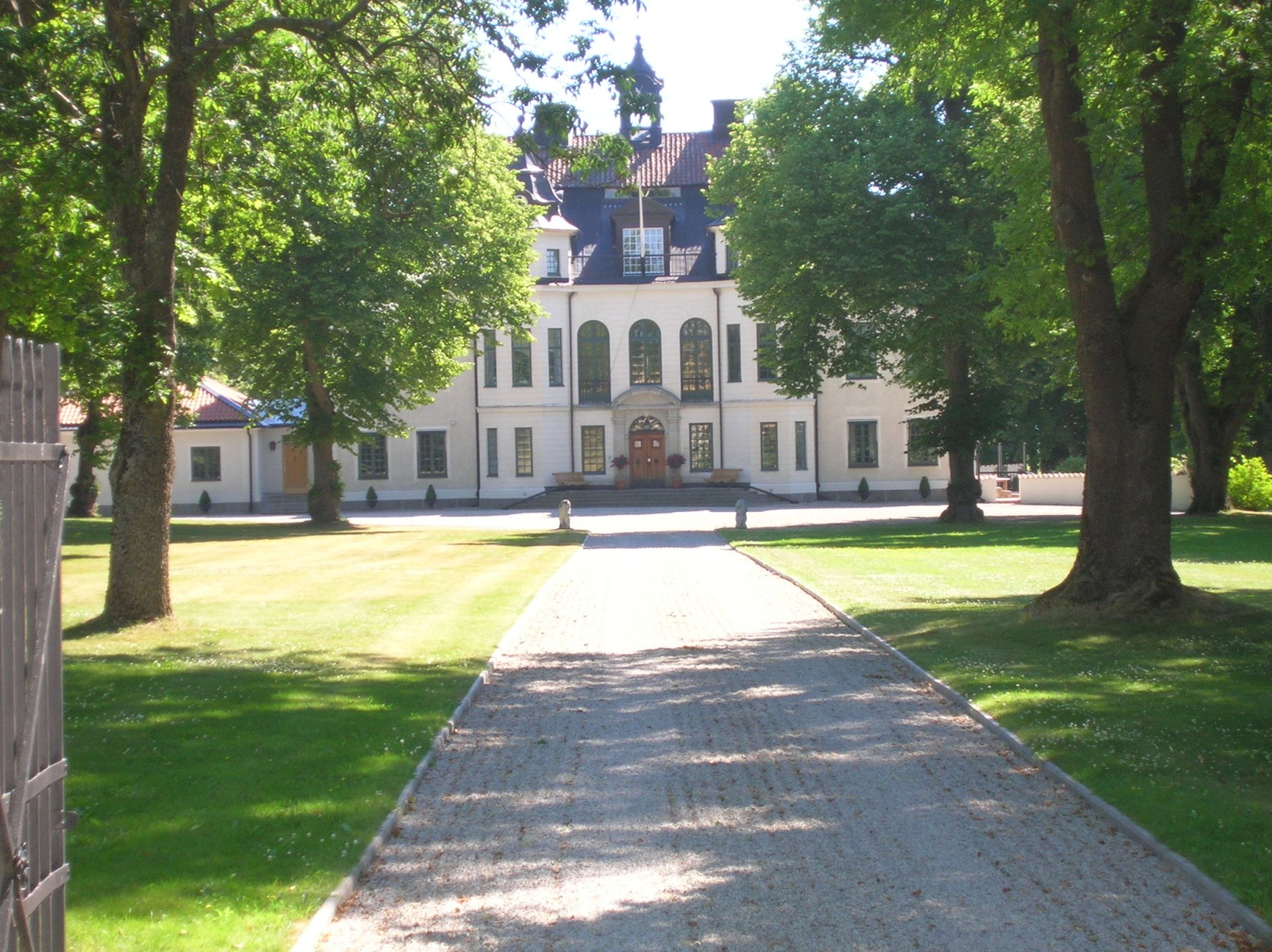 Björnsnäs herrgård, Norrköpings kommun, Sweden.